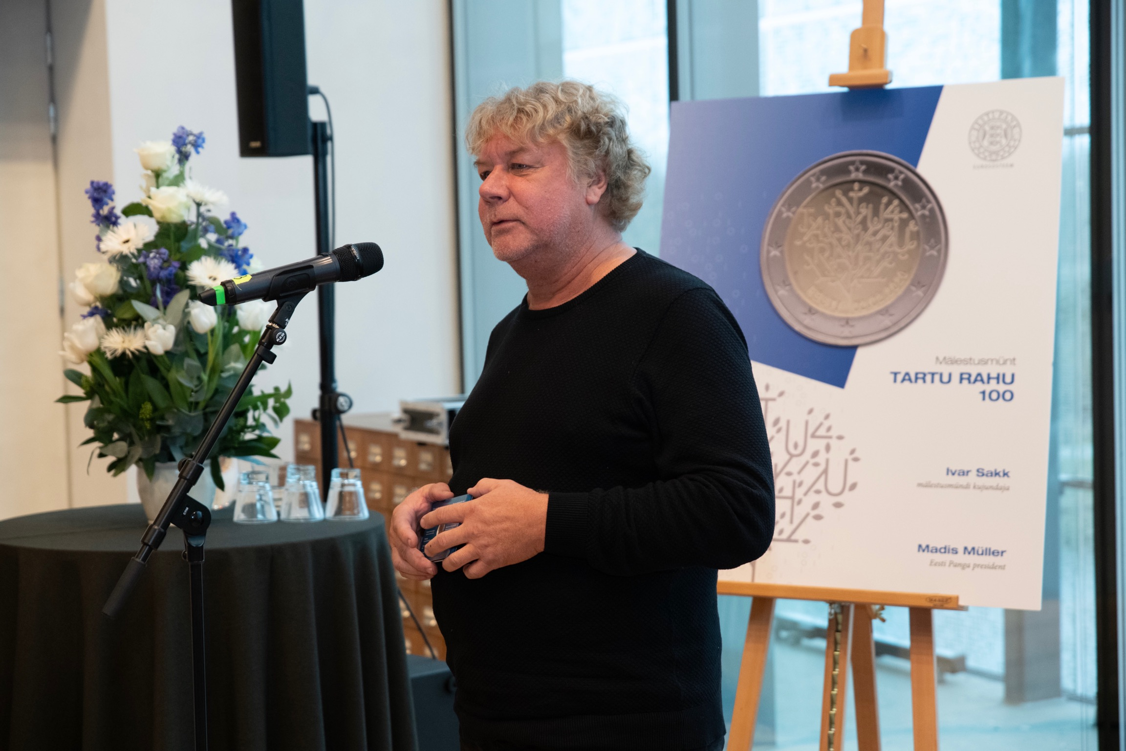 Ivar Sakk, Tartu rahu 100 käibemündi esitlus